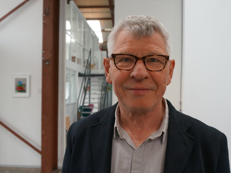 Peer Veneman, Nederlands beeldhouwer